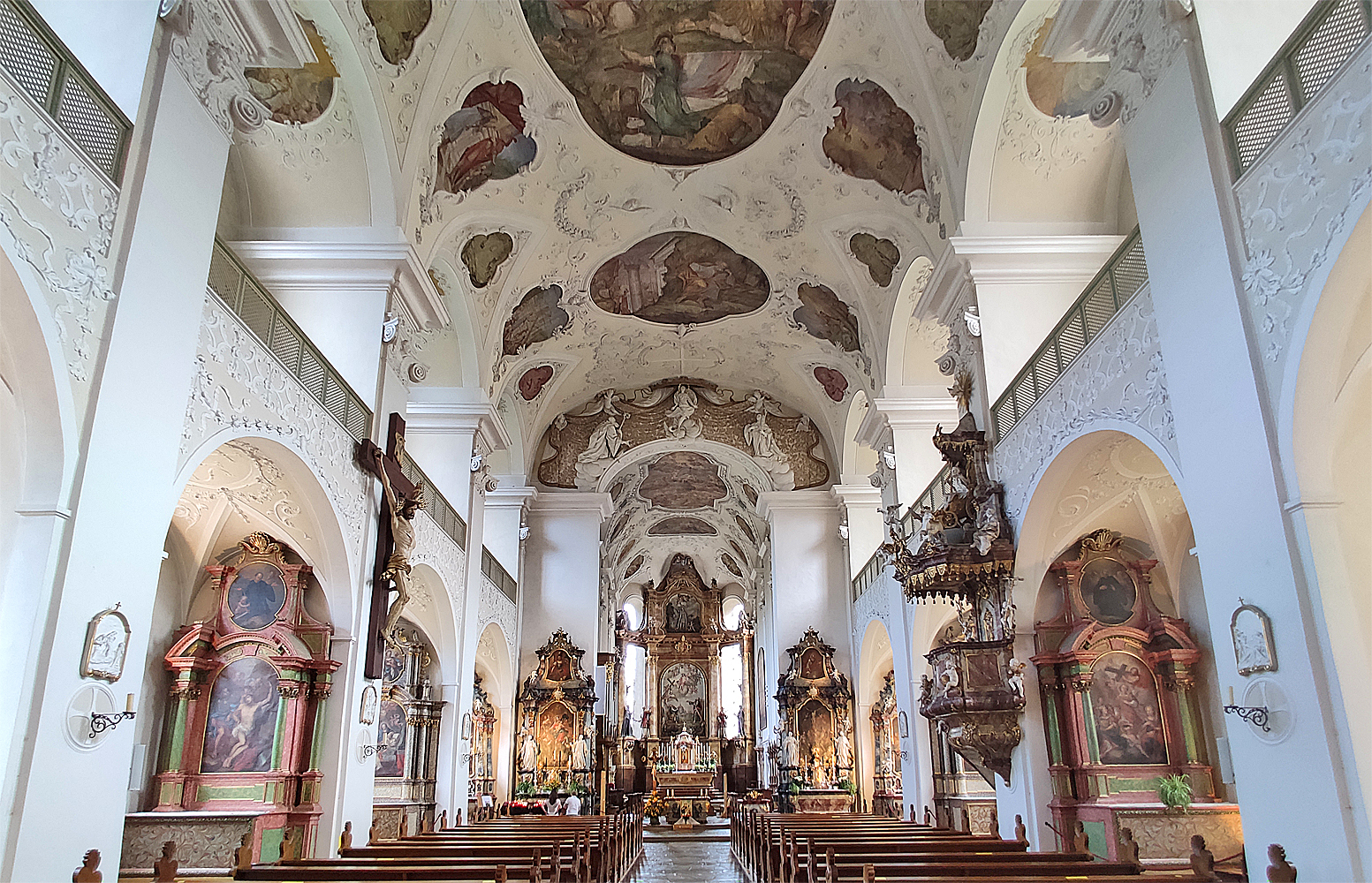 Innenansicht der Klosterkirche St. Trudpert im Münstertal